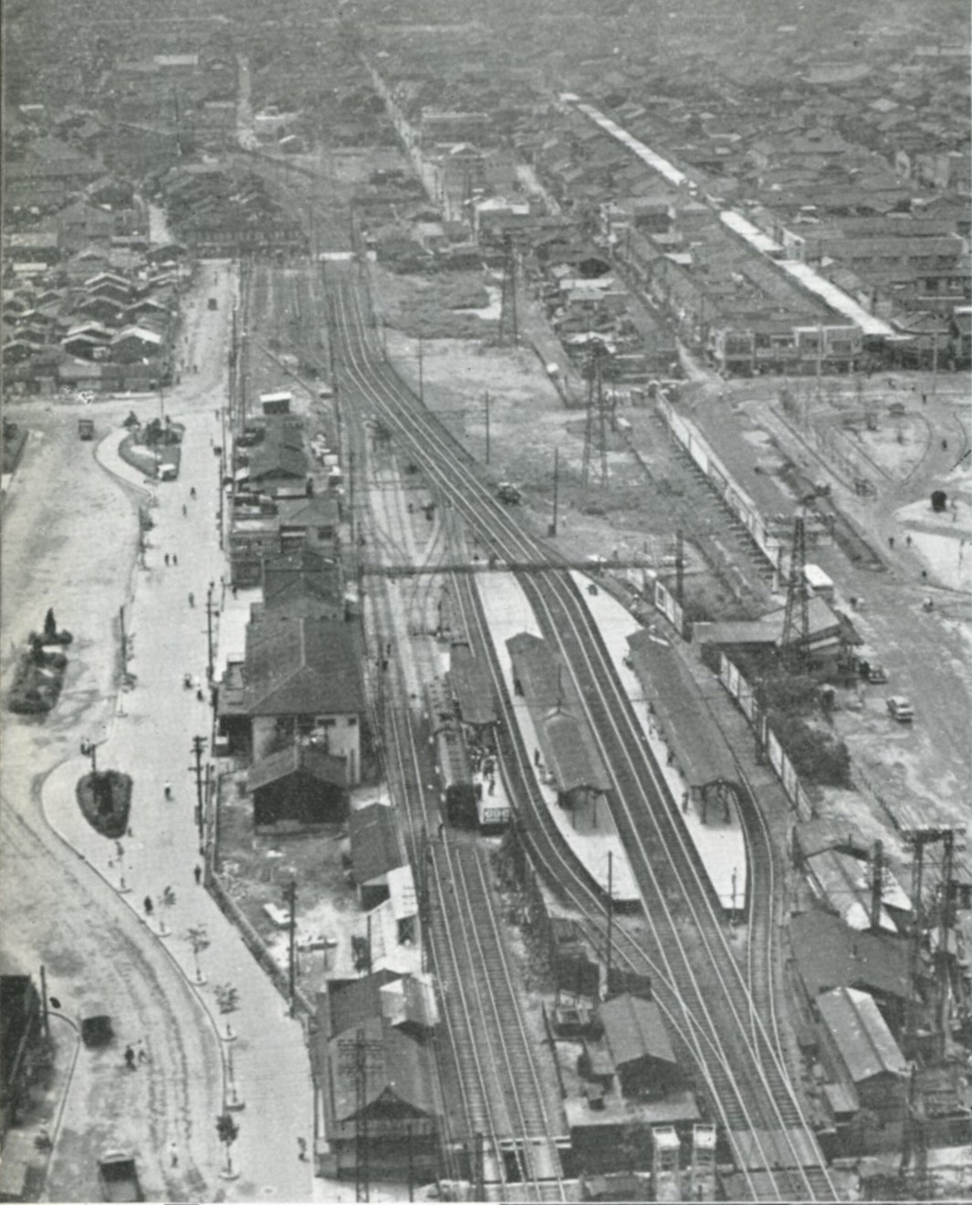 発刊時期から昭和29年頃と思われる阪神尼崎駅。右(北)側は本線、左(南)側は伝法線。右奥に商店街がある。